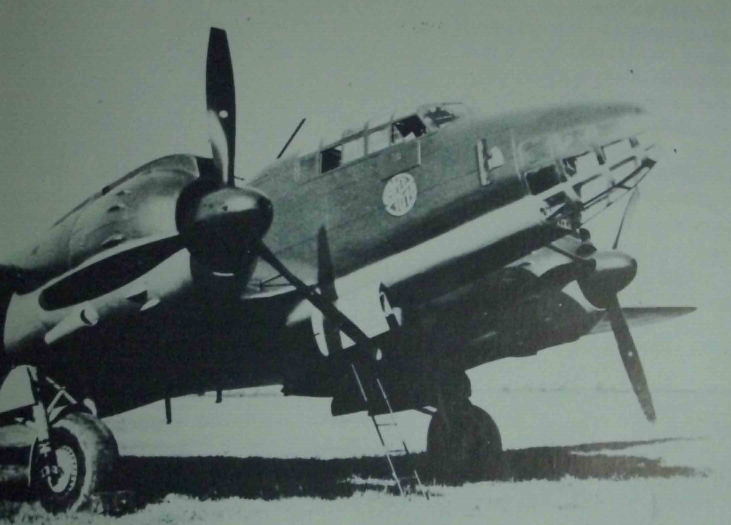 Cant Z.1018